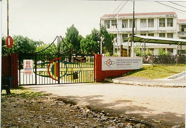 Wajah dari Pandangan Hadapan Sekolah